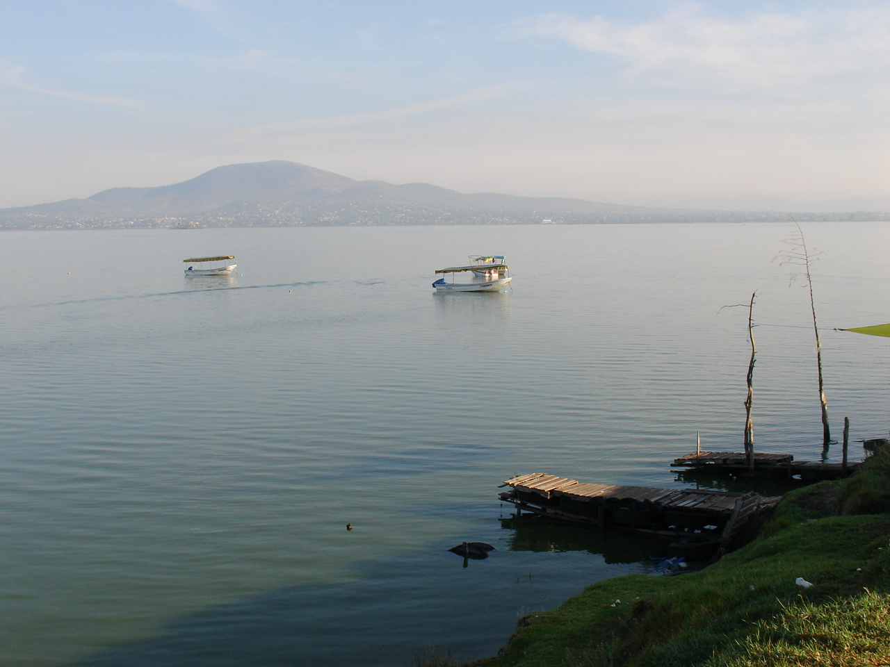 Estado de Méx.